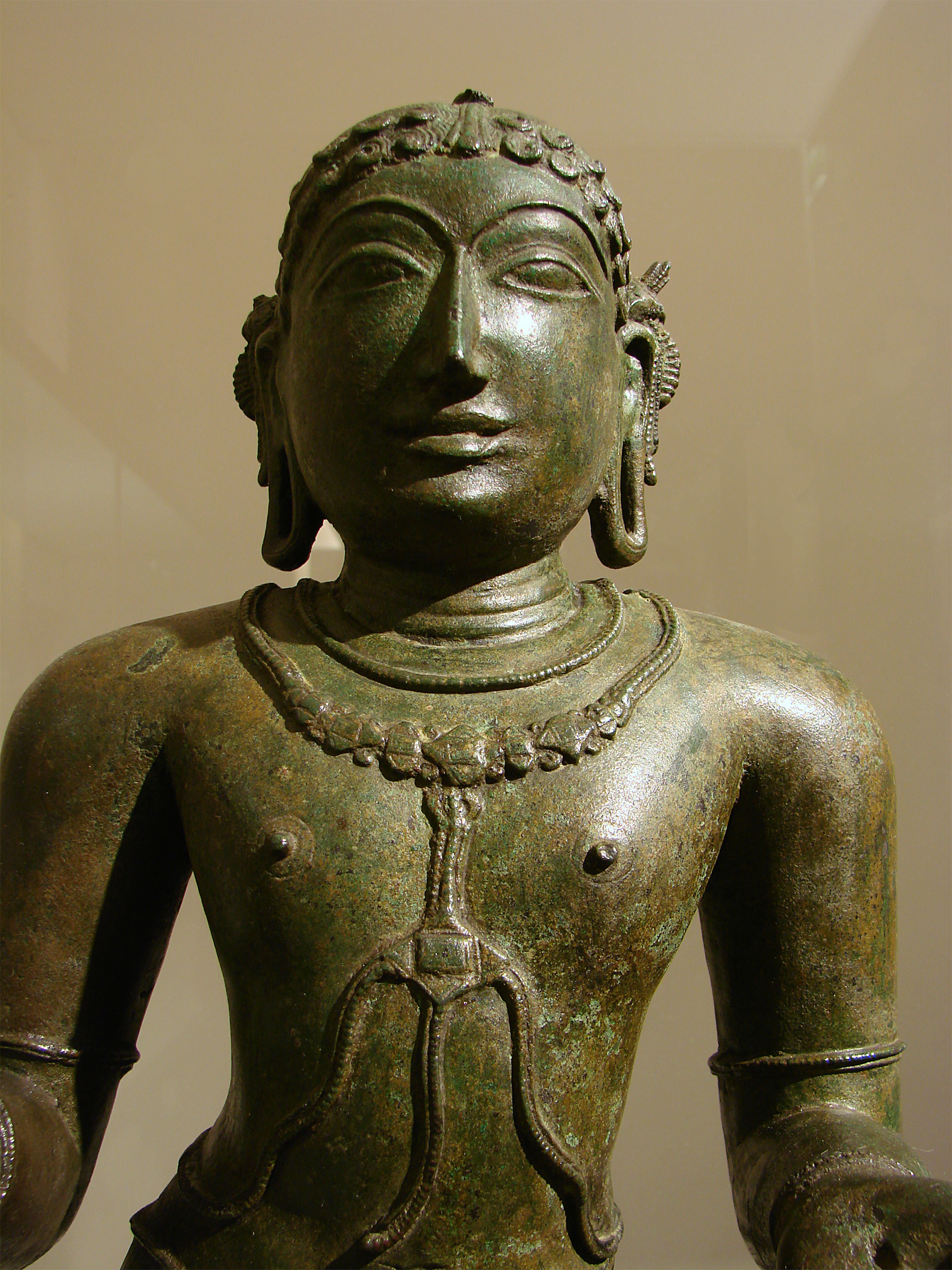 Le dévot shivaïte Sambandar. Inde, Tamil Nadu, époque Chola, 12ème - 13ème siècle. Musée Guimet, Paris.